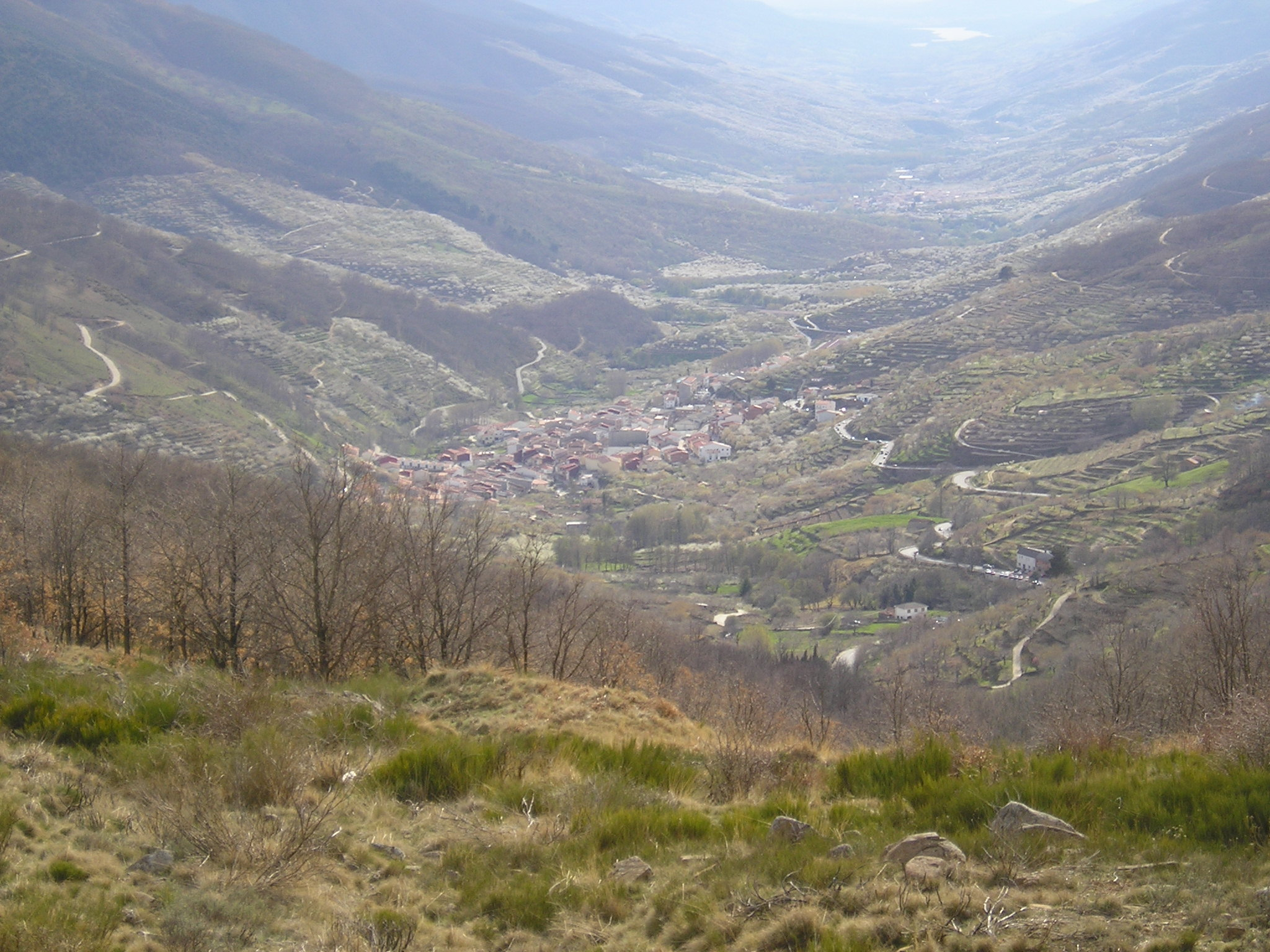 Panorámica del Valle del Jerte